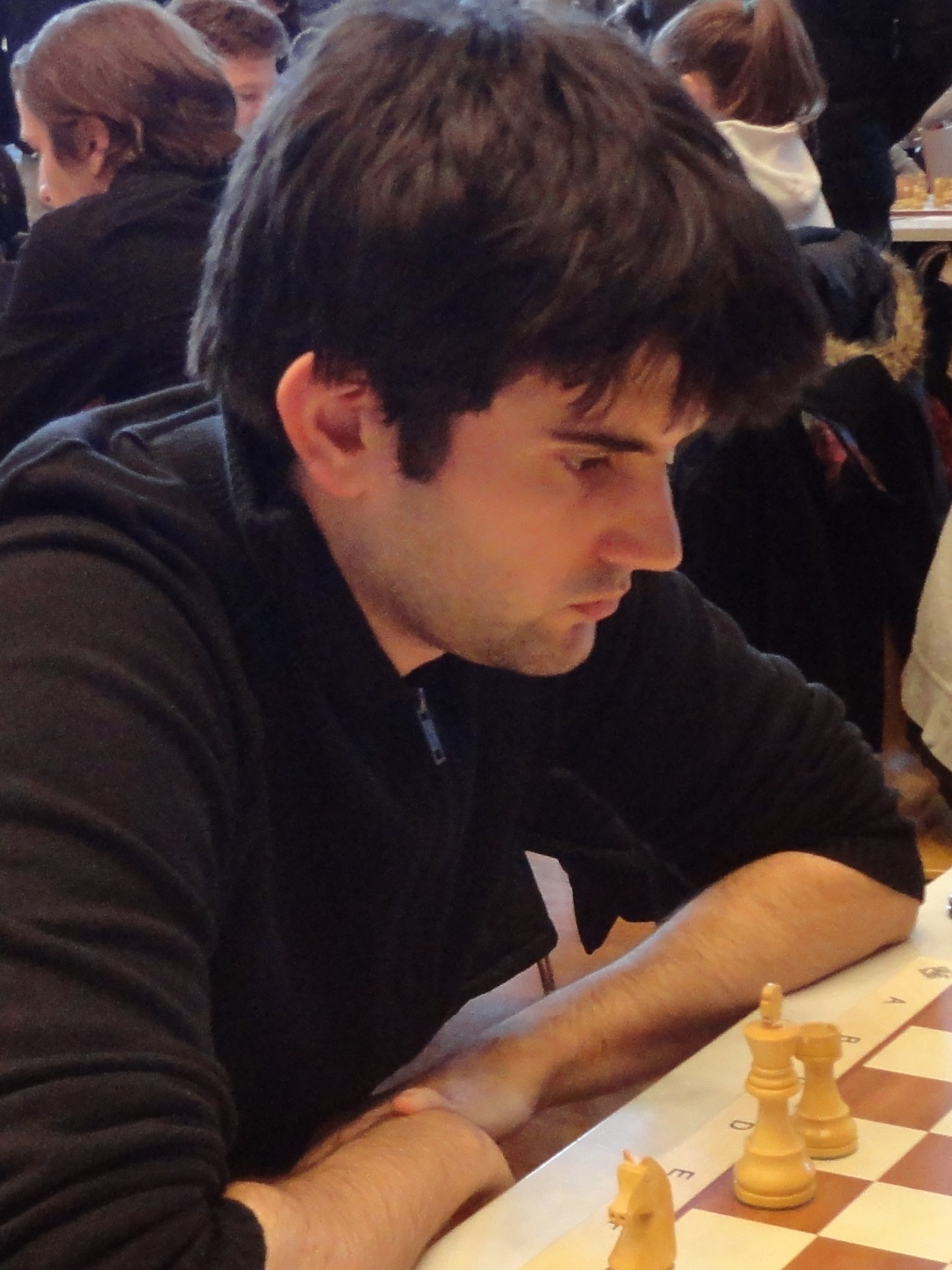 Sasa Martinovic, Grenke Chess Open 2016 in Karlsruhe.